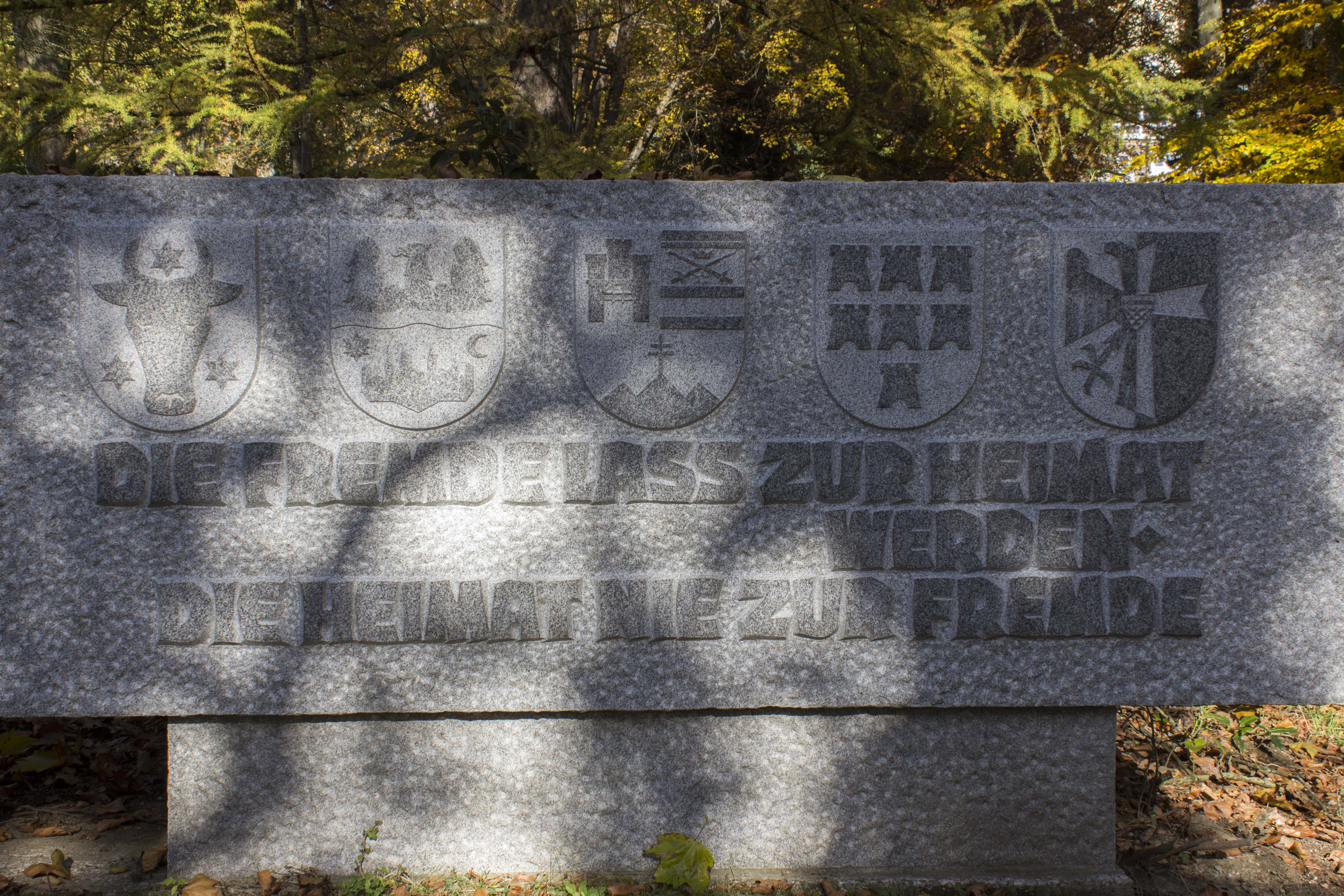 Rechter Teil des Denkmals für die Vertriebenen auf dem Pöstlingberg in Linz